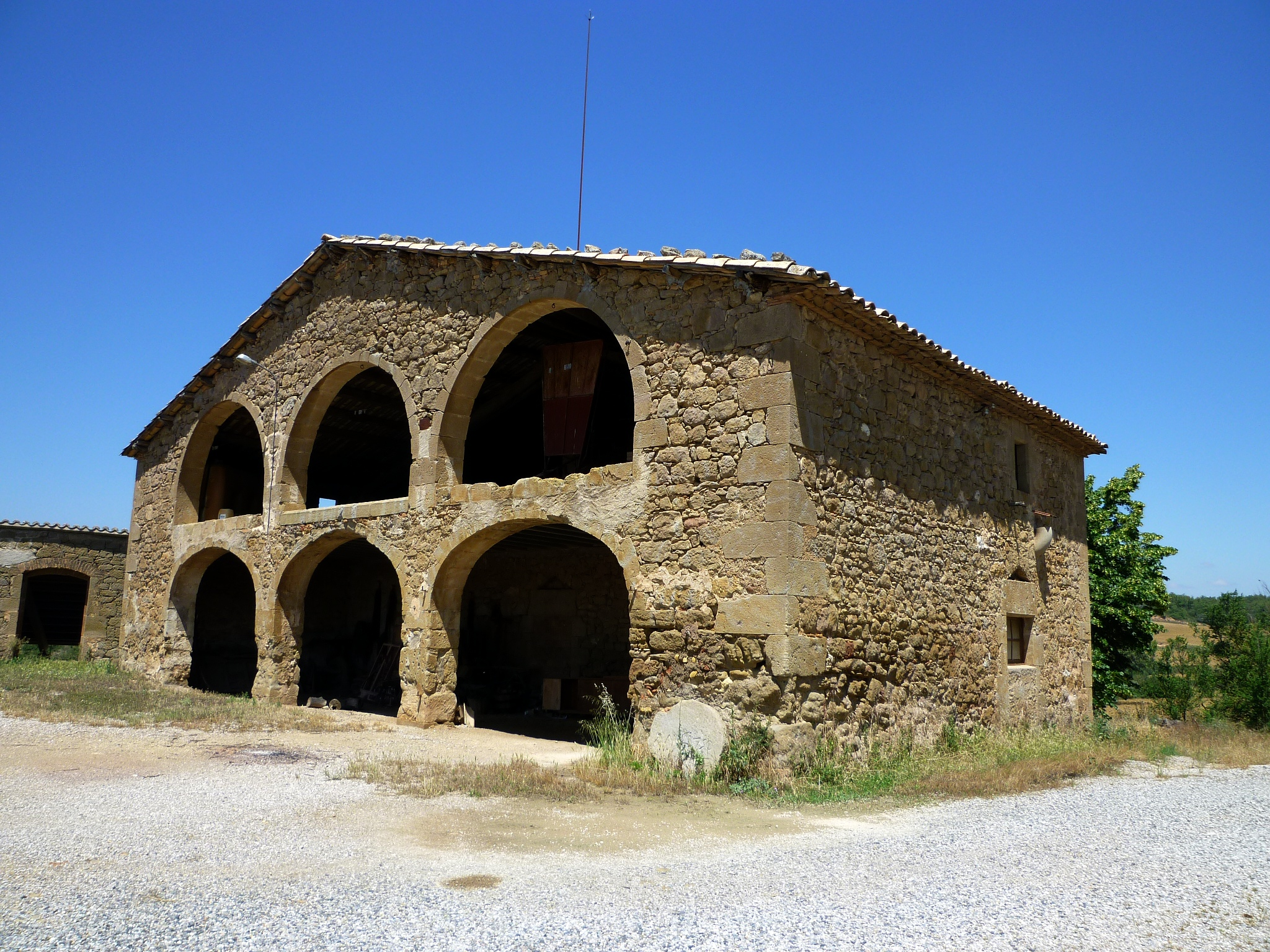 Masia la Codina (Pinell de Solsonès): la pallera